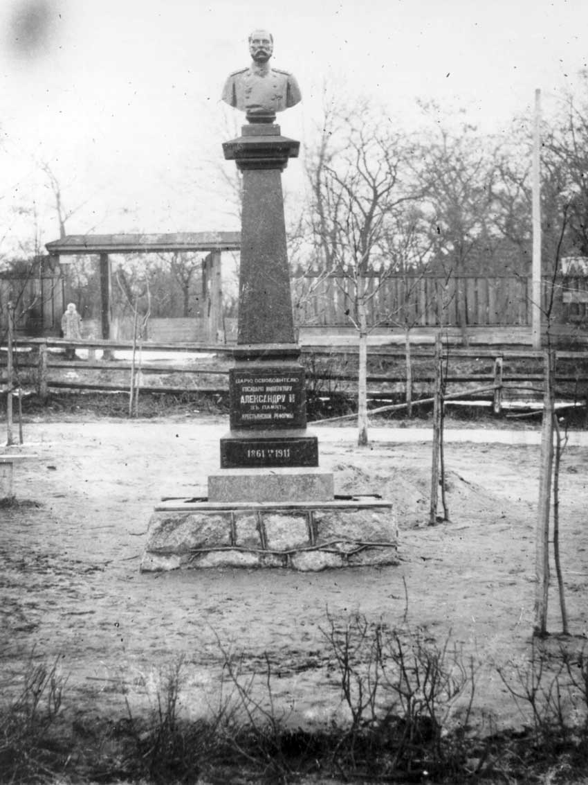 памятник Александру II